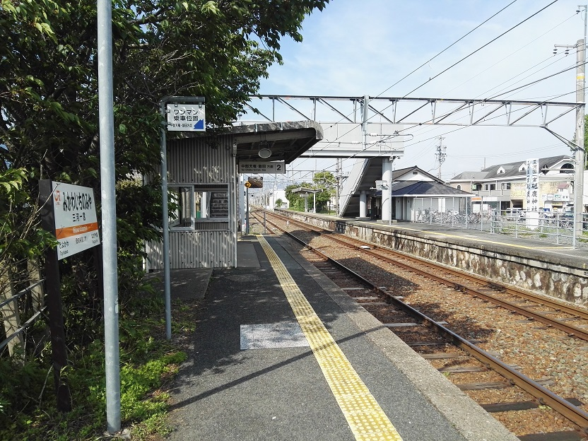 Mikawa-ichinomiya station platform